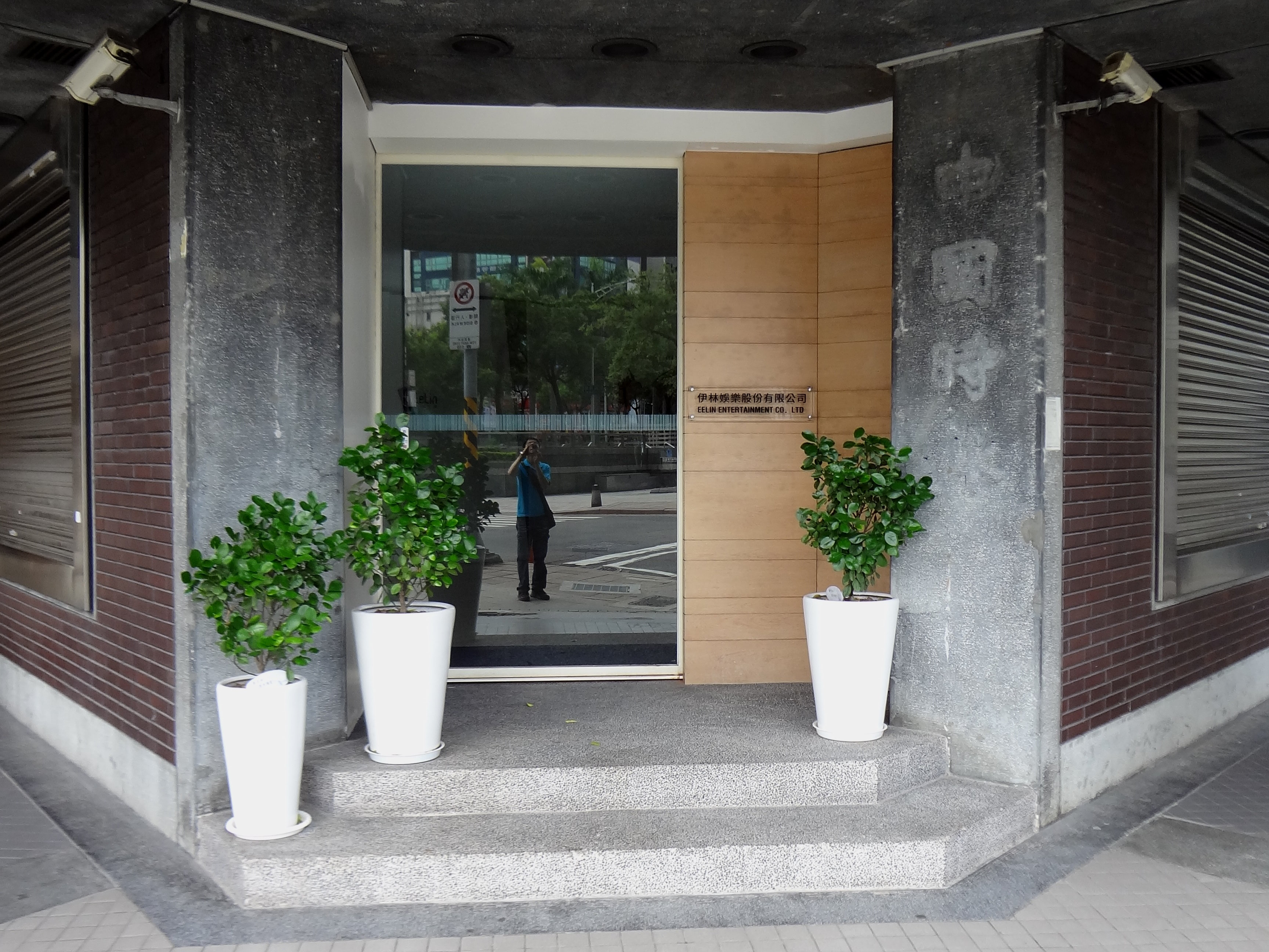 伊林娛樂總部，位於臺北市中正區中華路一段51號（原中國時報大樓）。